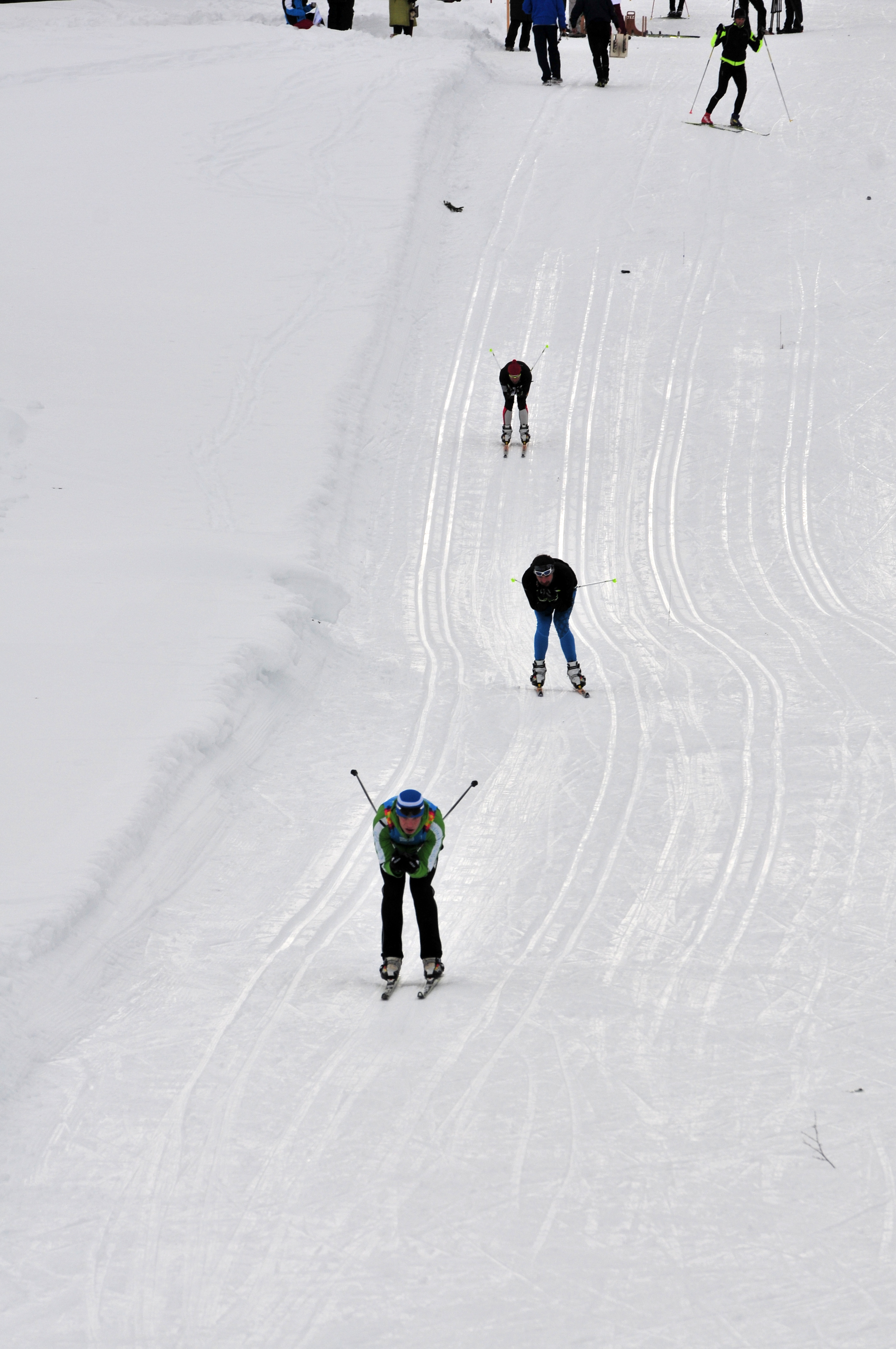 1. Jugendolympiade 2012, Seefeld in Tirol Erste Olympische Jugend- Winterspiele 201213. bis 22. Jänner in Innsbruck Dieses Foto wurde durch die Unterstützung von Wikimedia Österreich und die Twoonix Software GmbH ermöglicht.